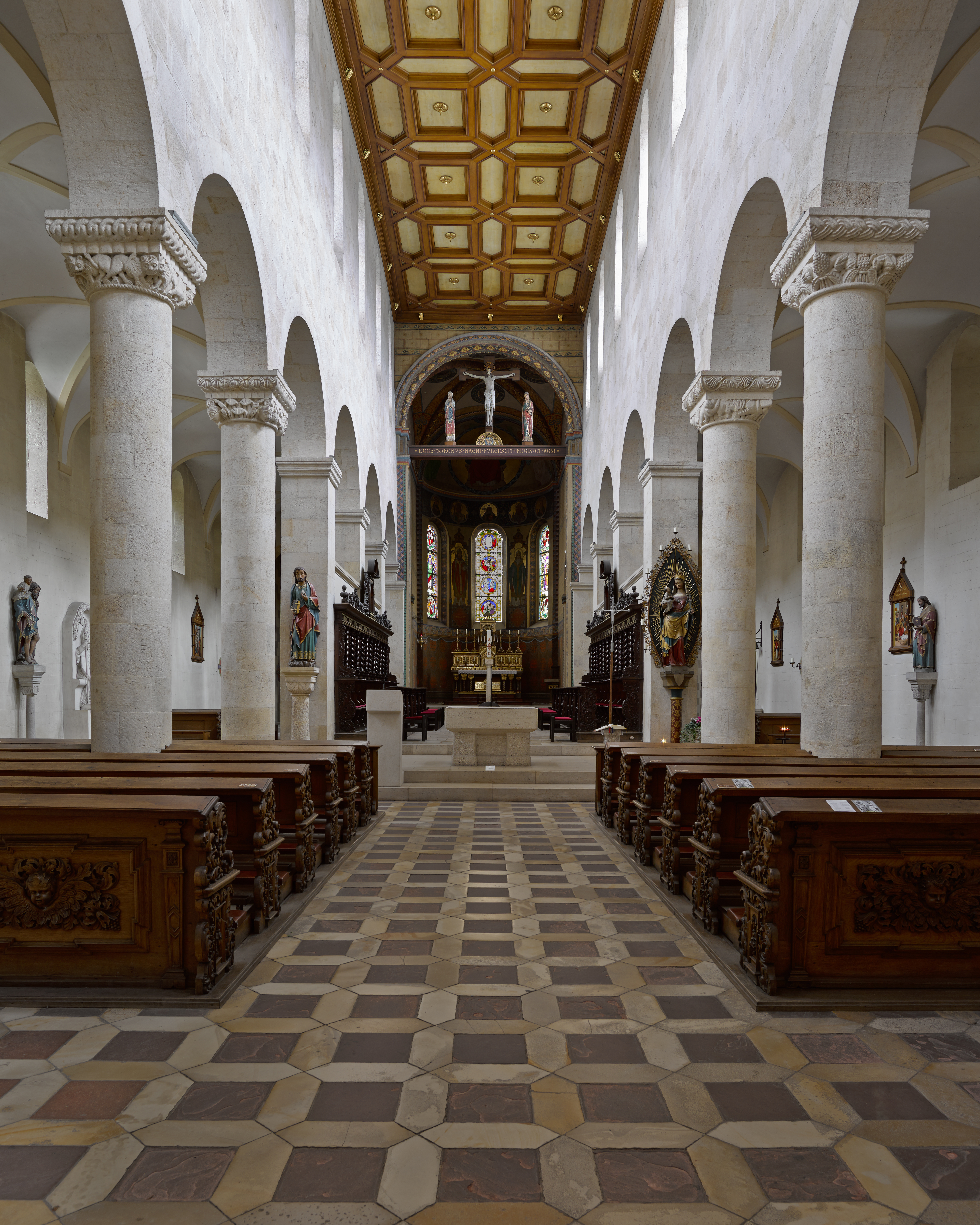 Innenraum der Schottenkirche St. Jakob